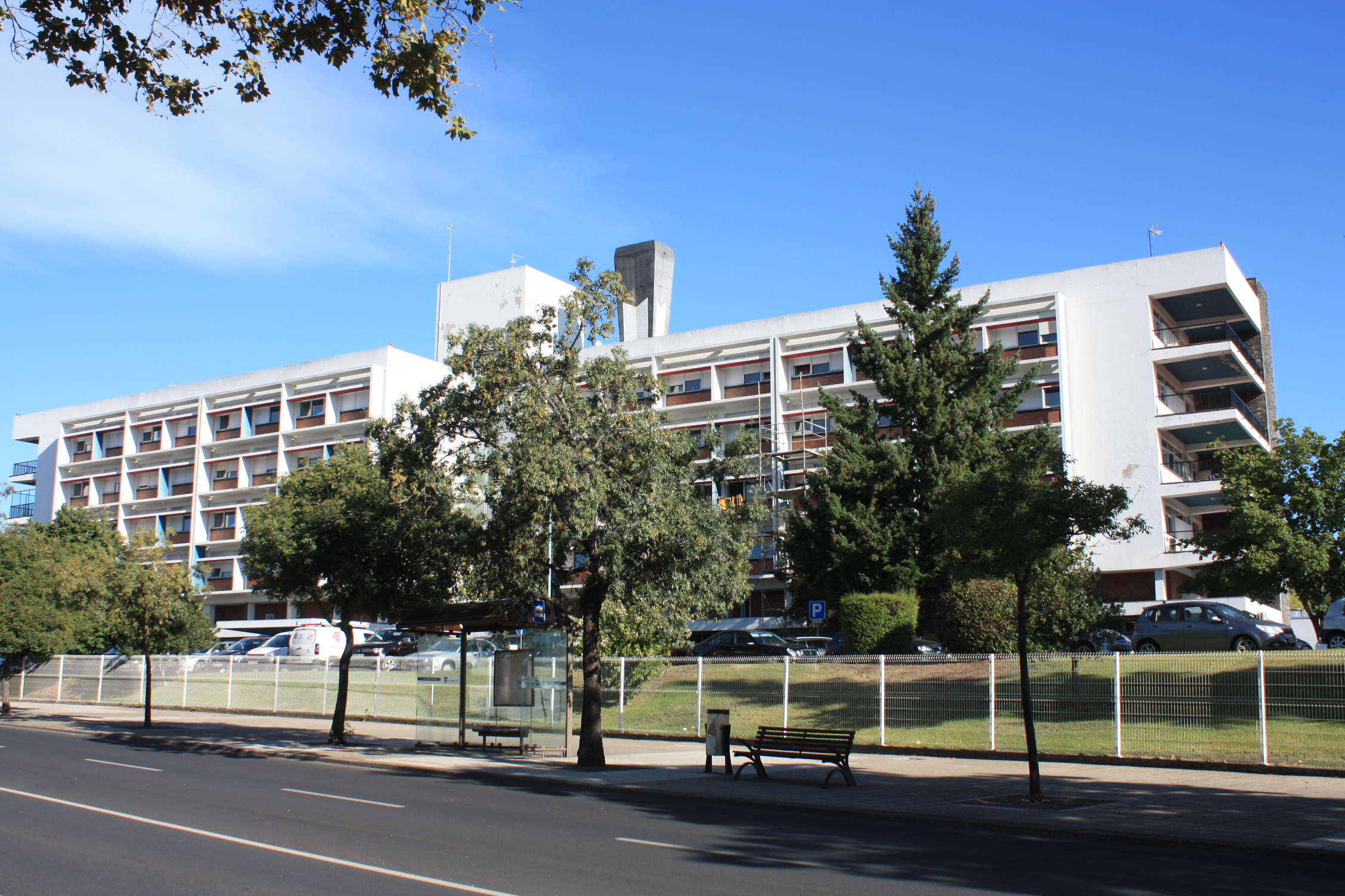 Hospital Regional de Bragança e Centro de Saúde Mental - hospital em Bragança, Portugal Cultural propertyHospital Regional de Bragança e Centro de Saúde Mental, Sé (Bragança), Sé, Santa Maria e Meixedo, Bragança, Bragança District, Portugal Q66813465, SIPA ID: 17462, DGPC ID: 328667 Wiki Loves Monuments ID: DGPC-328667